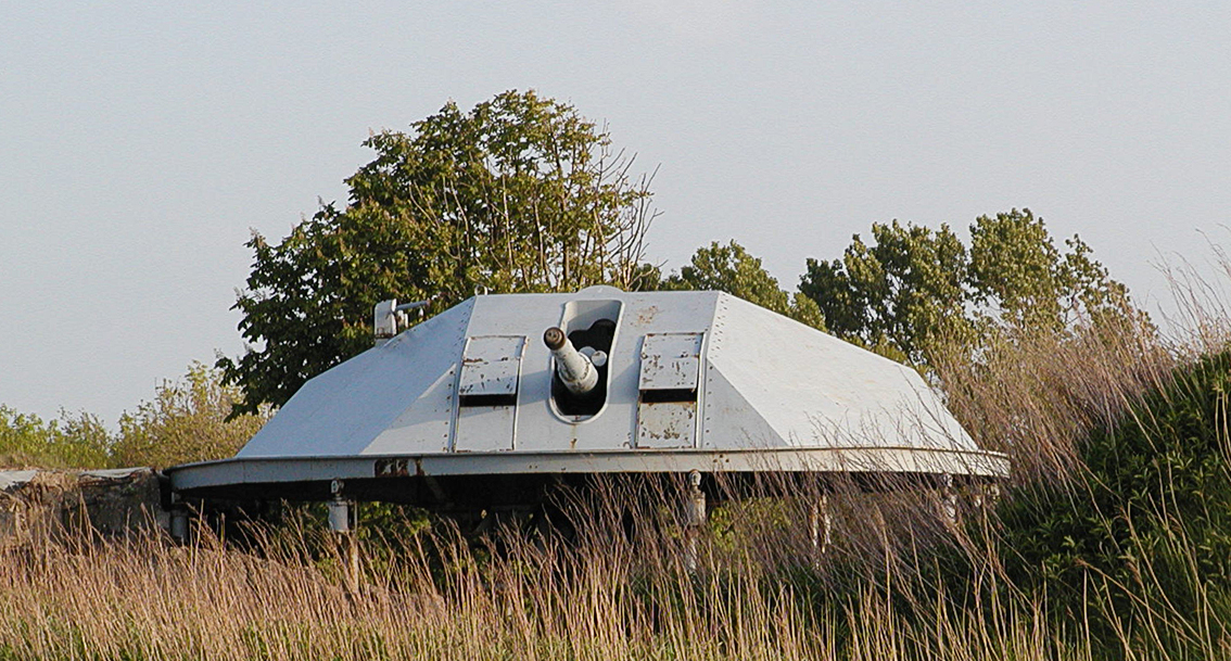 Ein Geschütz des Fort Kugelbake